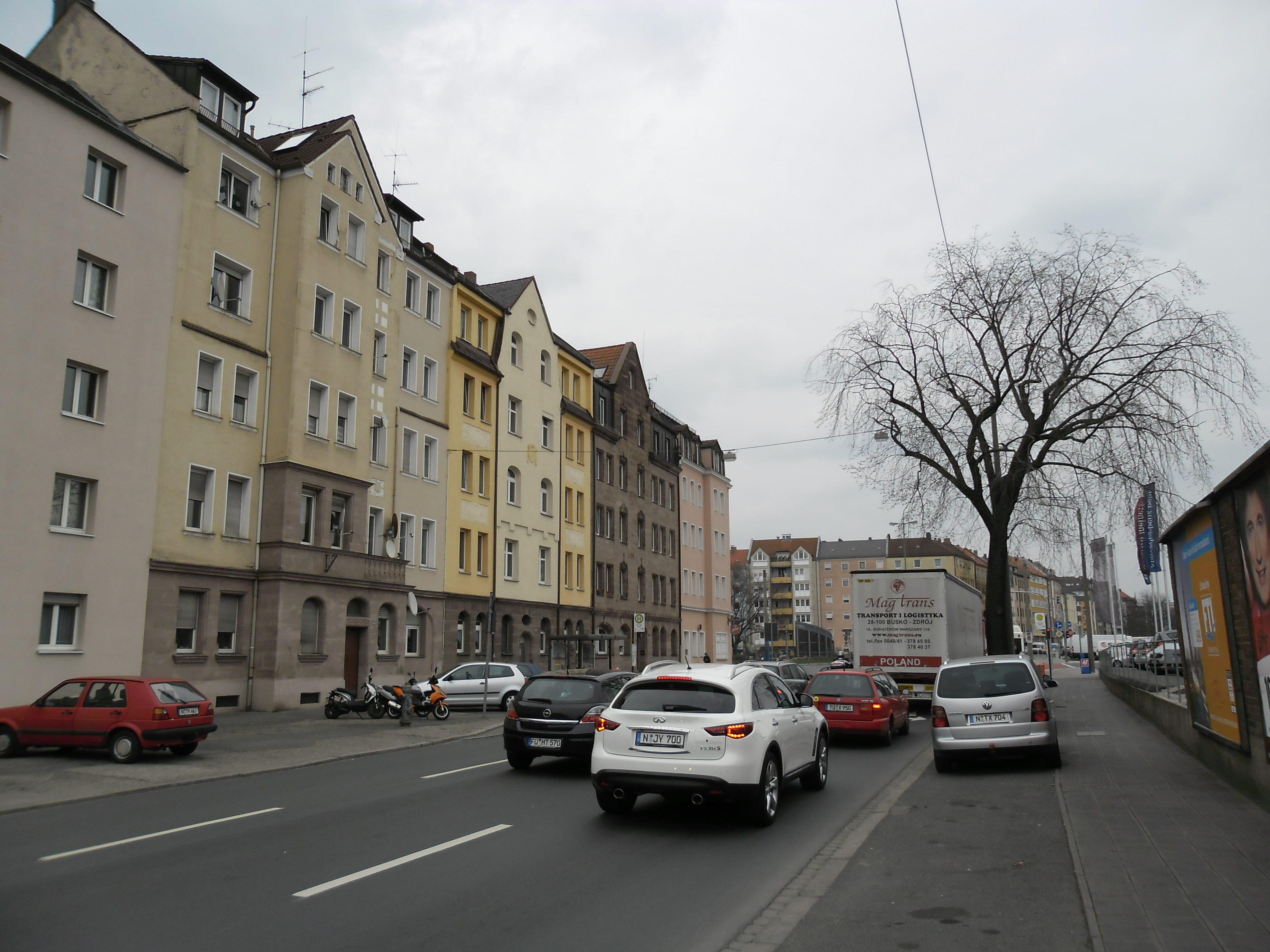 Frankenstraße 105 bis 111